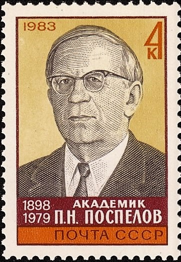 Почтовая марка СССР. Академик П. Н. Поспелов. Номер в каталоге ЦФА 5404